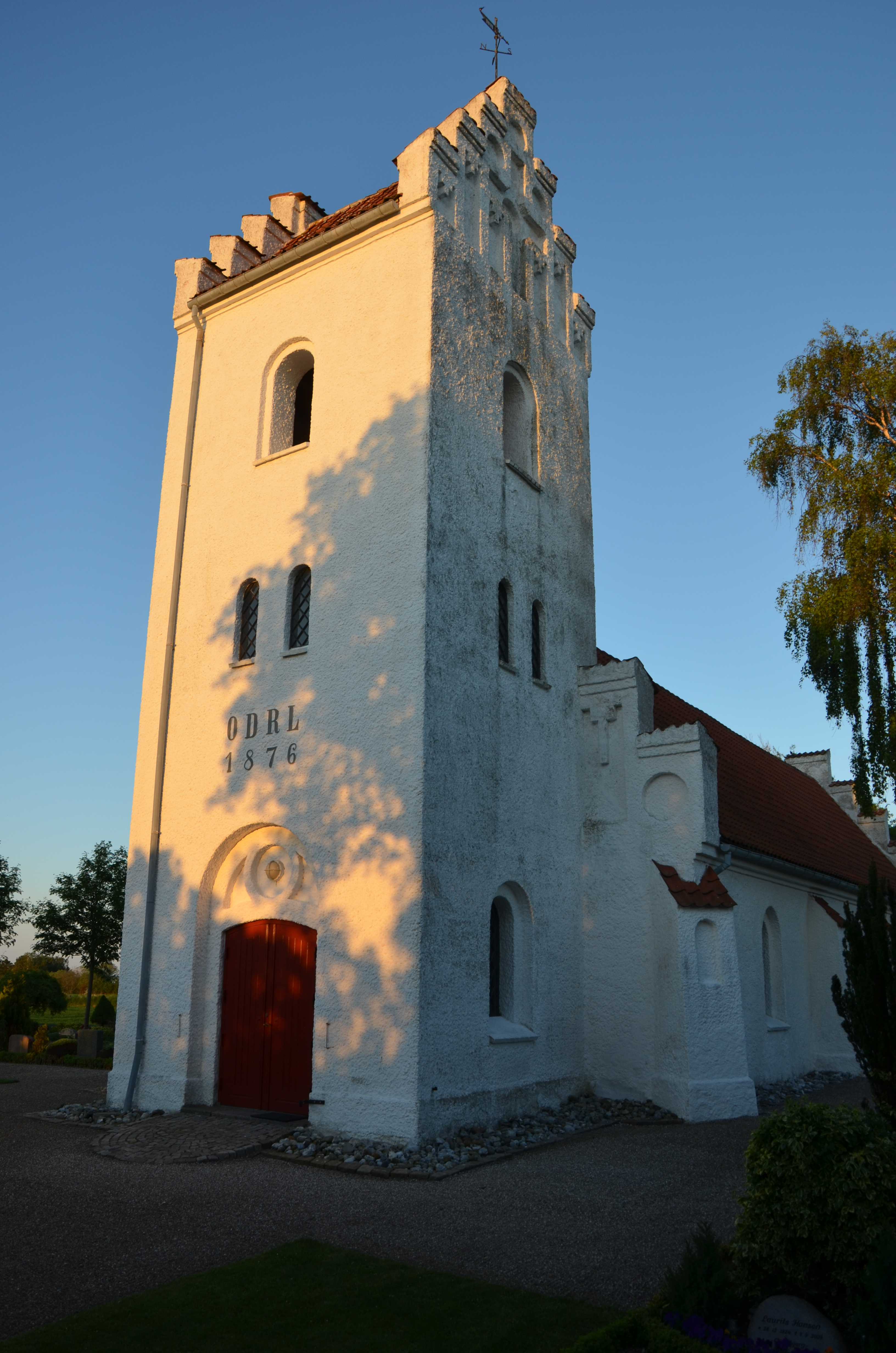 Kirche des Kirchspiels Avernakø auf der gleichnamigen Insel